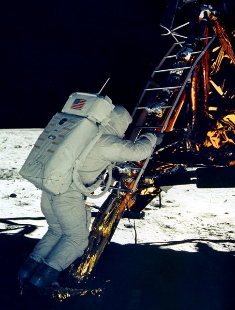 Apollo 11 - Aldrin-Ausstieg